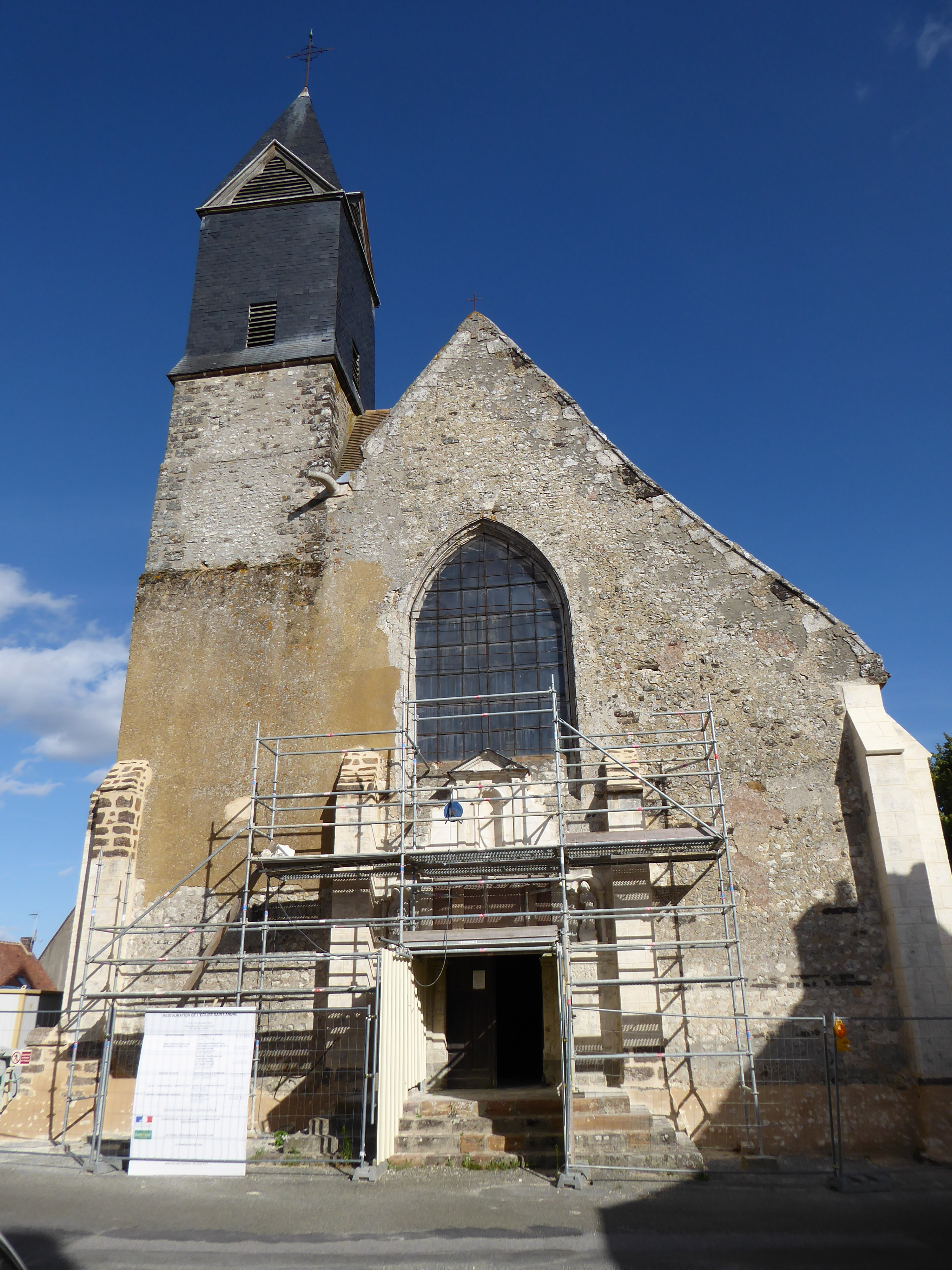 l'église Saint-Martin en restauration à l'été 2016, Frétigny, Eure-et-Loir, France.